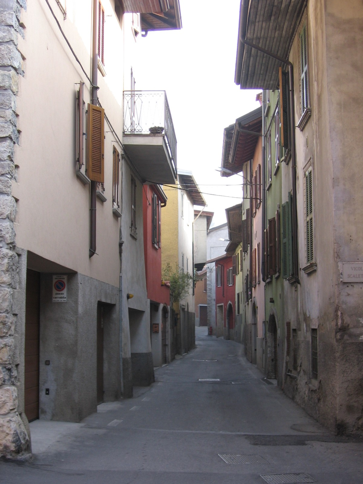 Gazzaniga, Bergamo, Italia